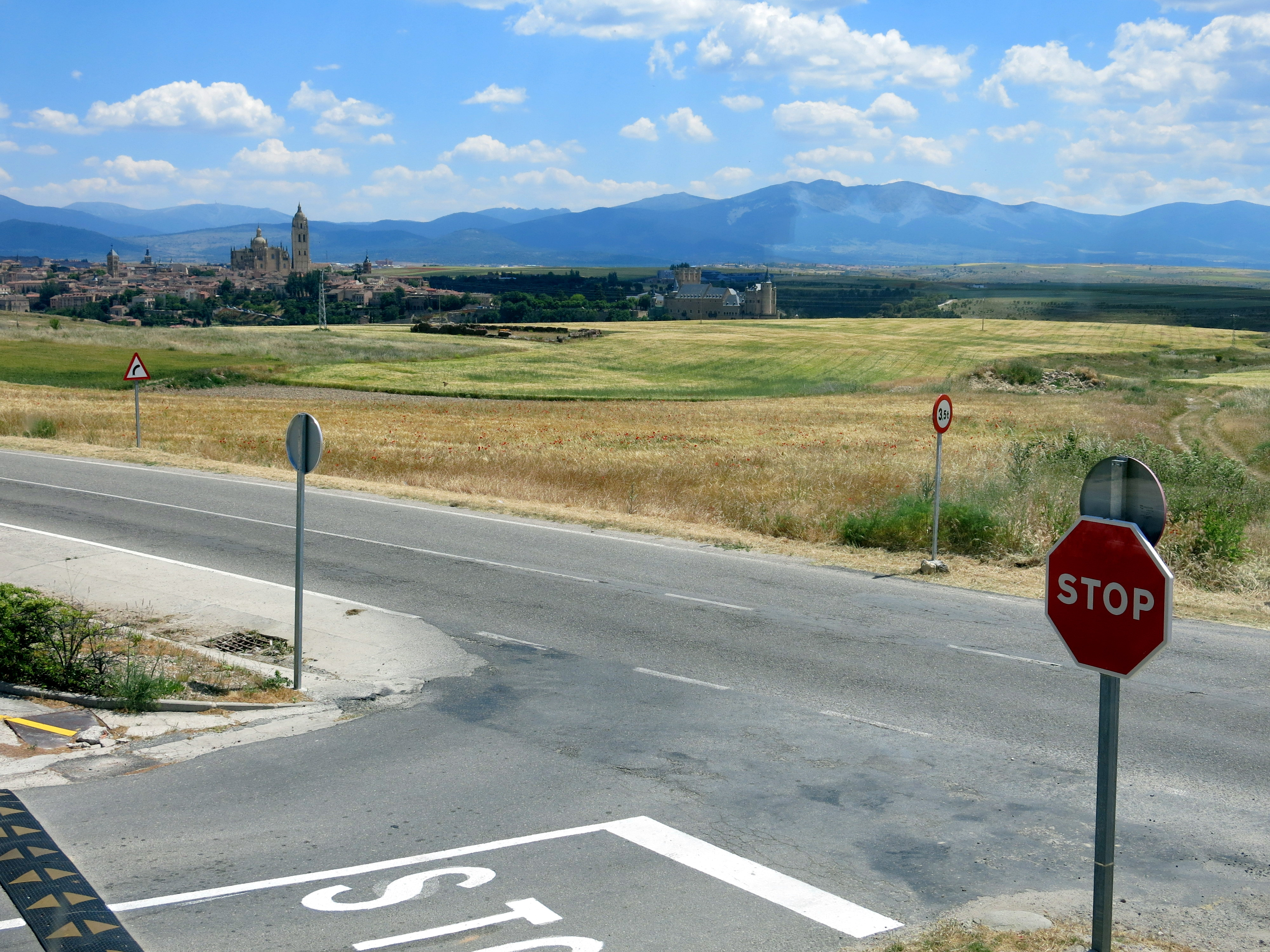 Segovia y sierra de Guadarrama